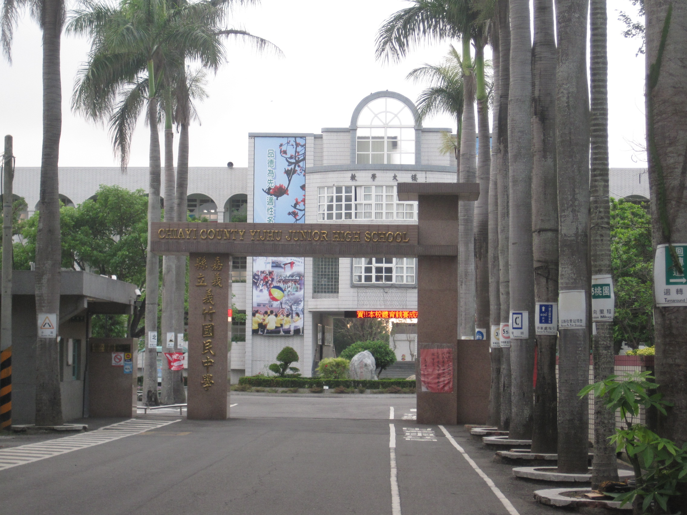 嘉義縣義竹國中